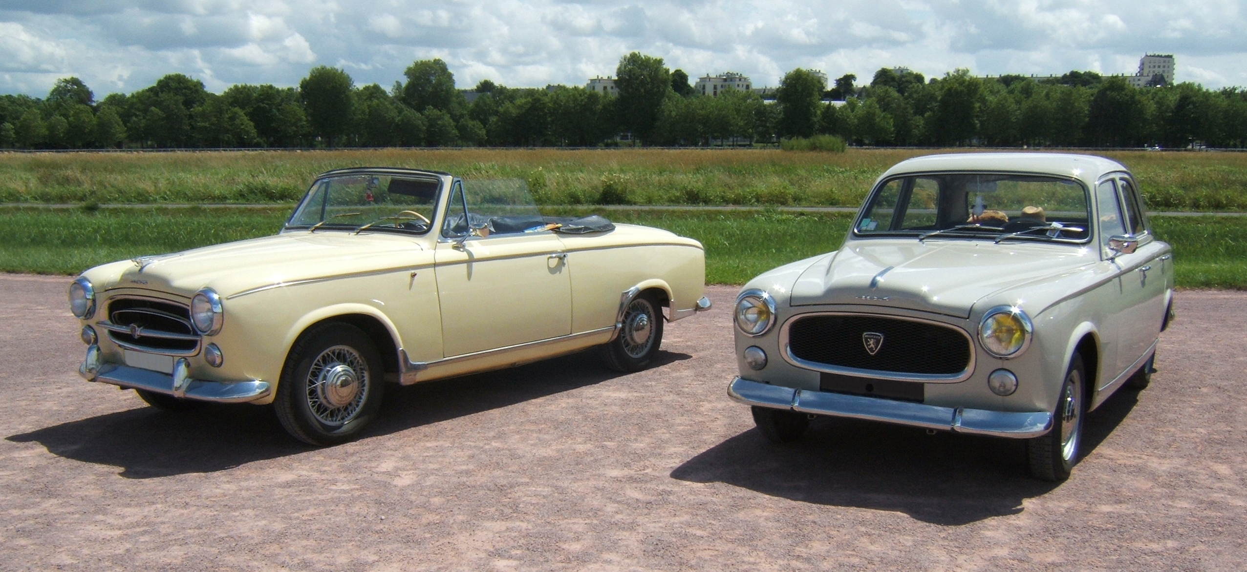 Deux Peugeot 403 côte à côte : un cabriolet et une berline.